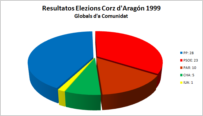 Aragonés: Grafico d'as elezions á Corz d'Aragón de la añada 1999